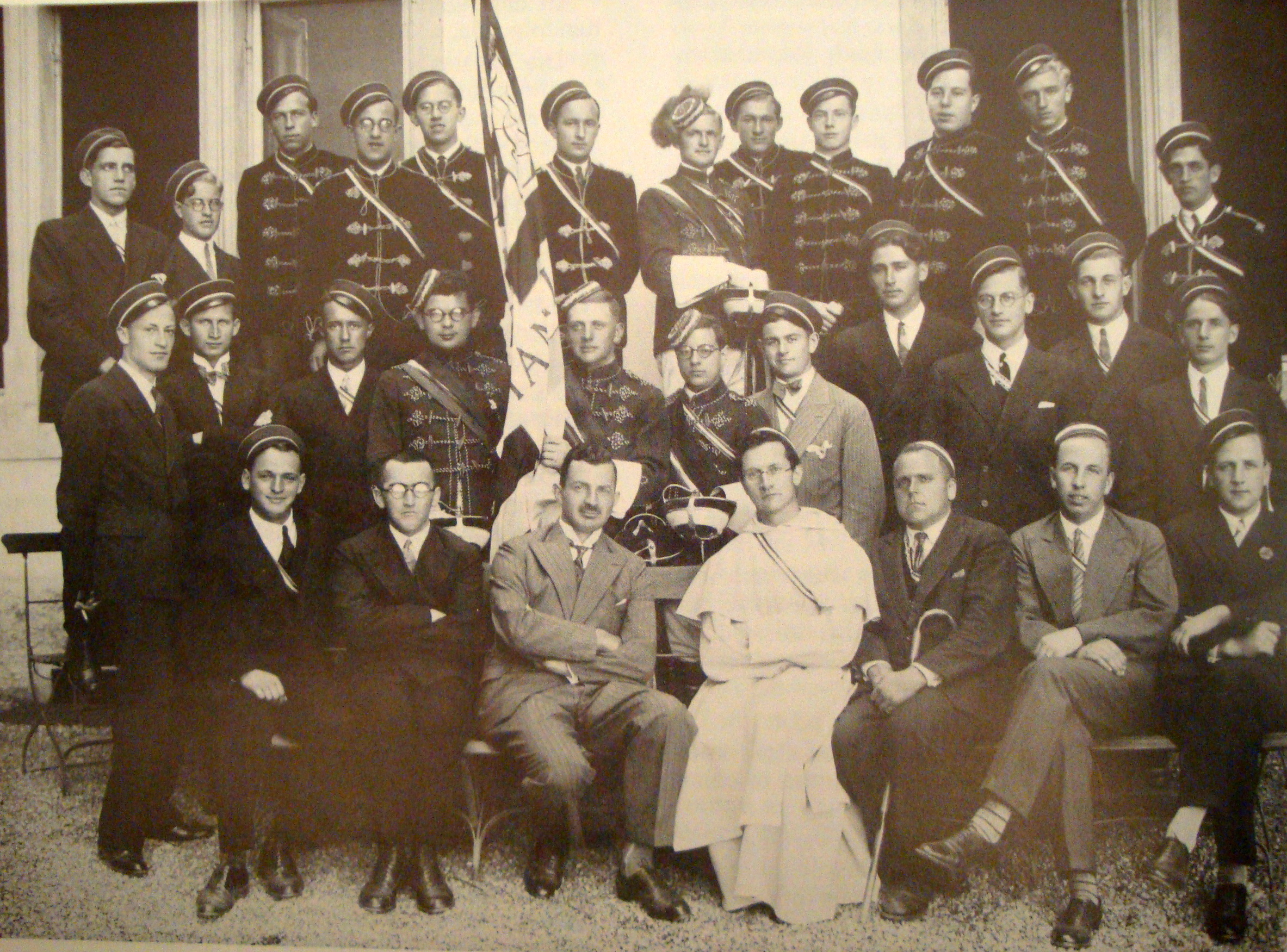 Historisches Foto der AKV Alemannia Sommersemester 1931